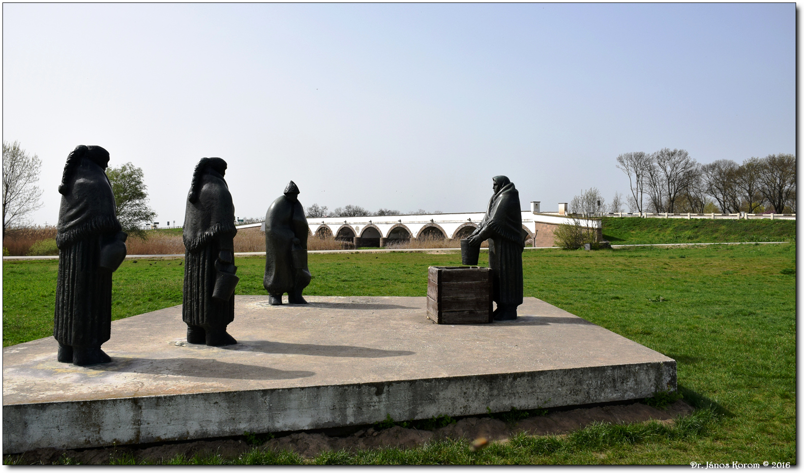 Somogyi Árpád: Vízhordók szobra (1983), Magyarország, Hajdú-Bihar megye, Hortobágy